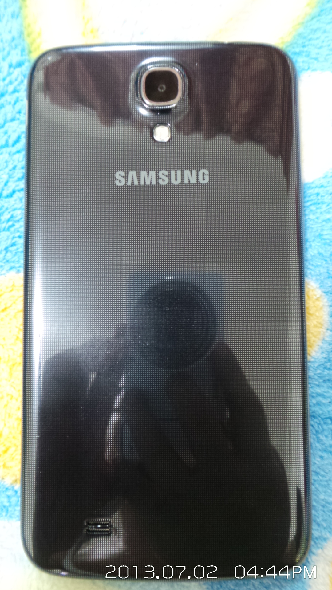 위 사진은 Samsung Galaxy Mega 6.3 후면 로서 사진을찍으신분이 위키미디어에 업로드를 원하시고 위키미디어에 파일이 공유되는것을 원하여 합의 후 올림